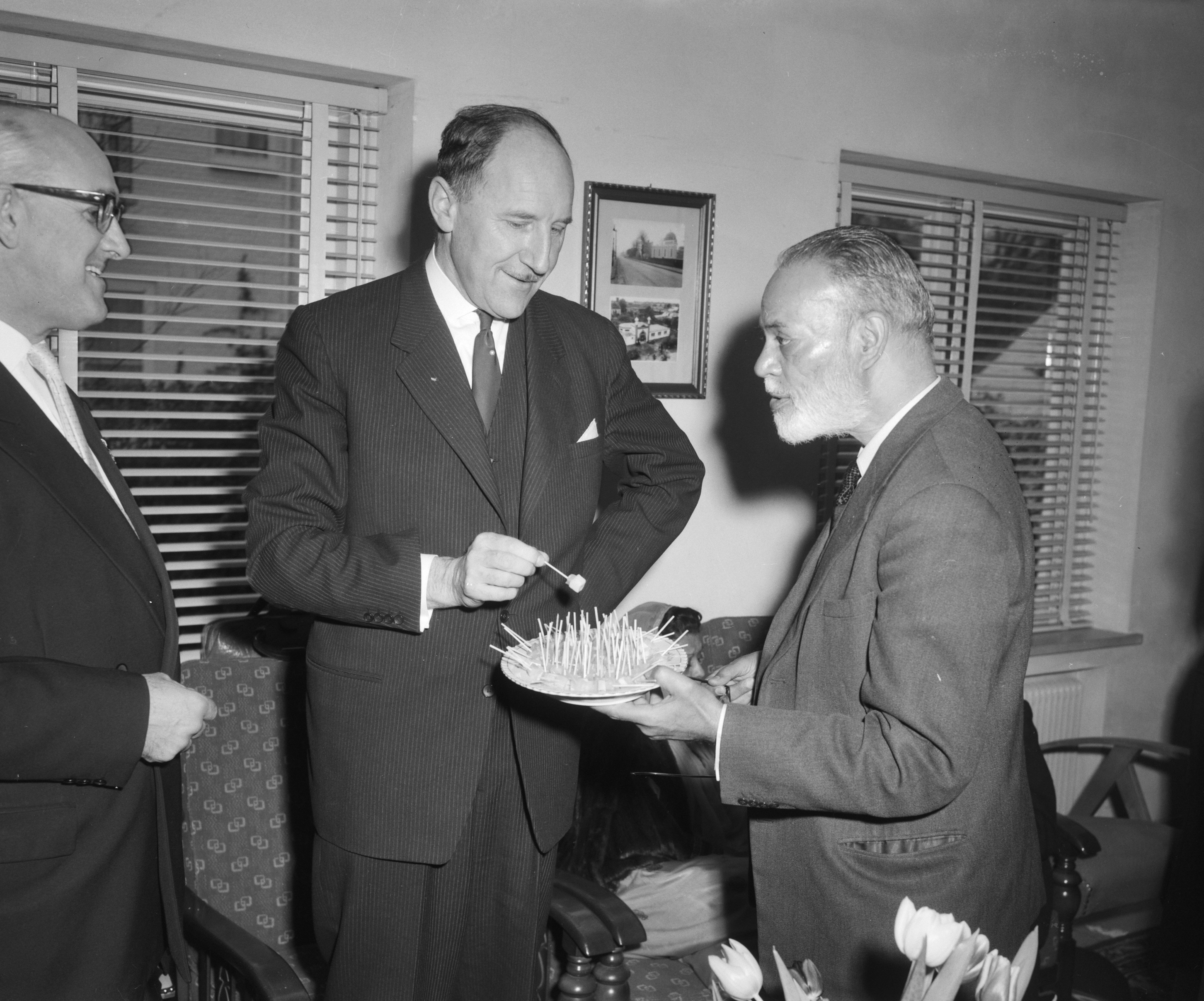 Collectie / Archief : Fotocollectie Anefo Reportage / Serie : [ onbekend ] Beschrijving : Afscheidsreceptie van de vice president van het Internationaal Gerechtshof Sir Mohammed Zafrulla Khan Sir Mohammed Zafrulla biedt minister Luns verversing Datum : 4 februari 1961 Trefwoorden : afscheidsrecepties Persoonsnaam : Luns, J.A.M.H., Luns, Joseph, Zafrulla Khan, Mohammed Fotograaf : Behrens, Herbert / Anefo Auteursrechthebbende : Nationaal Archief Materiaalsoort : Negatief (zwart/wit) Nummer archiefinventaris : bekijk toegang 2.24.01.04 Bestanddeelnummer : 912-0483